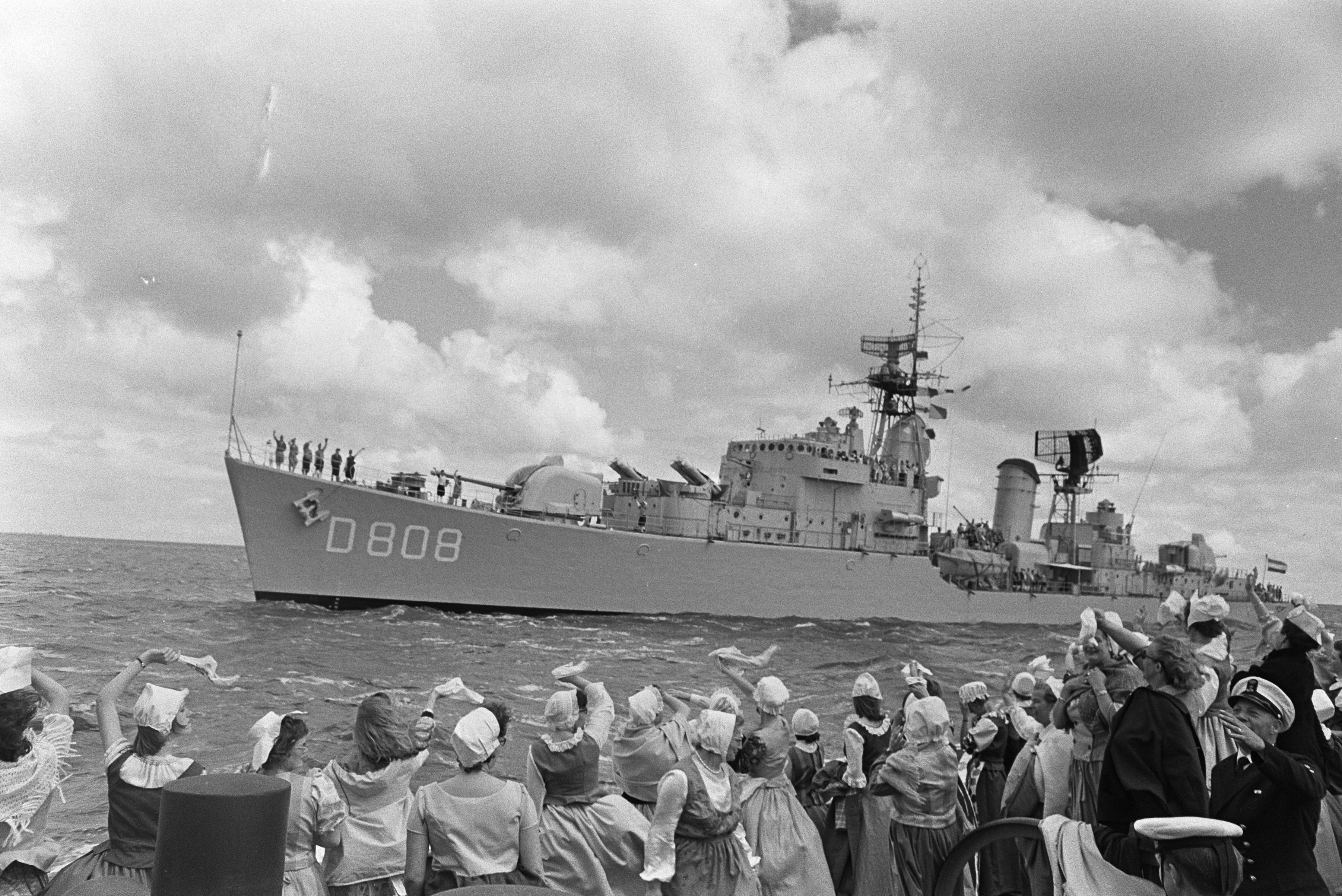 Collectie / Archief : Fotocollectie Anefo Reportage / Serie : [ onbekend ] Beschrijving : Hr. Ms. Jager Holland naar Chatham Datum : 8 juni 1967 Persoonsnaam : Hr. Ms. Jager Holland Fotograaf : Nijs, Jac. de / Anefo Auteursrechthebbende : Nationaal Archief Materiaalsoort : Negatief (zwart/wit) Nummer archiefinventaris : bekijk toegang 2.24.01.05 Bestanddeelnummer : 920-3948